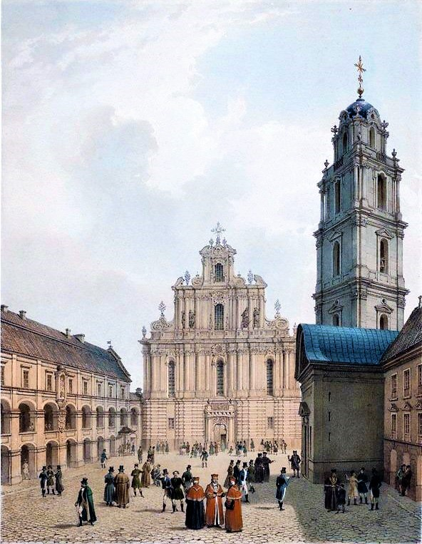 Название: Большой двор Виленского университета, Костёл Св. Иоаннов и Большой двор Виленского университета и